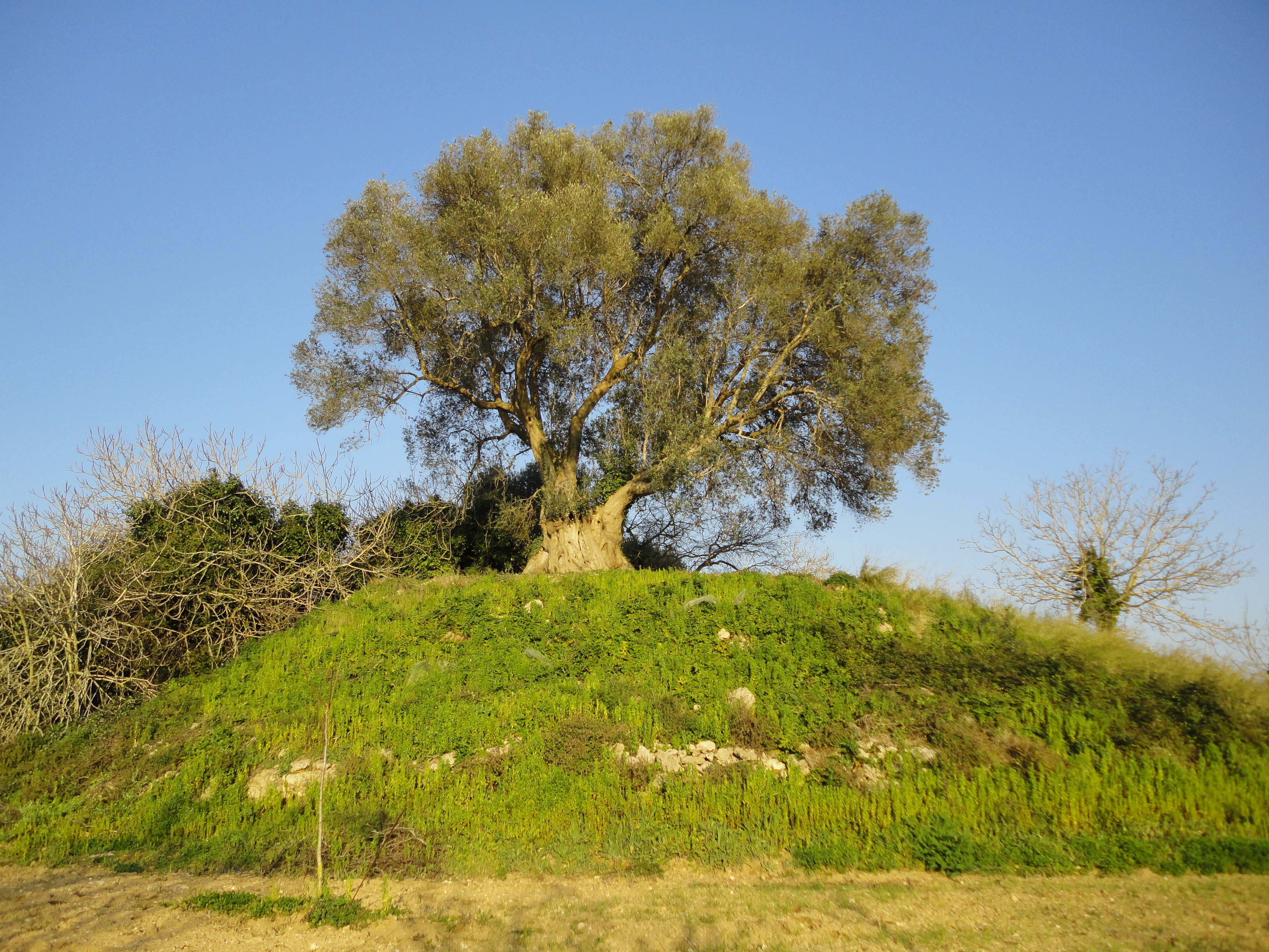 La Motta di Supersano, Lecce